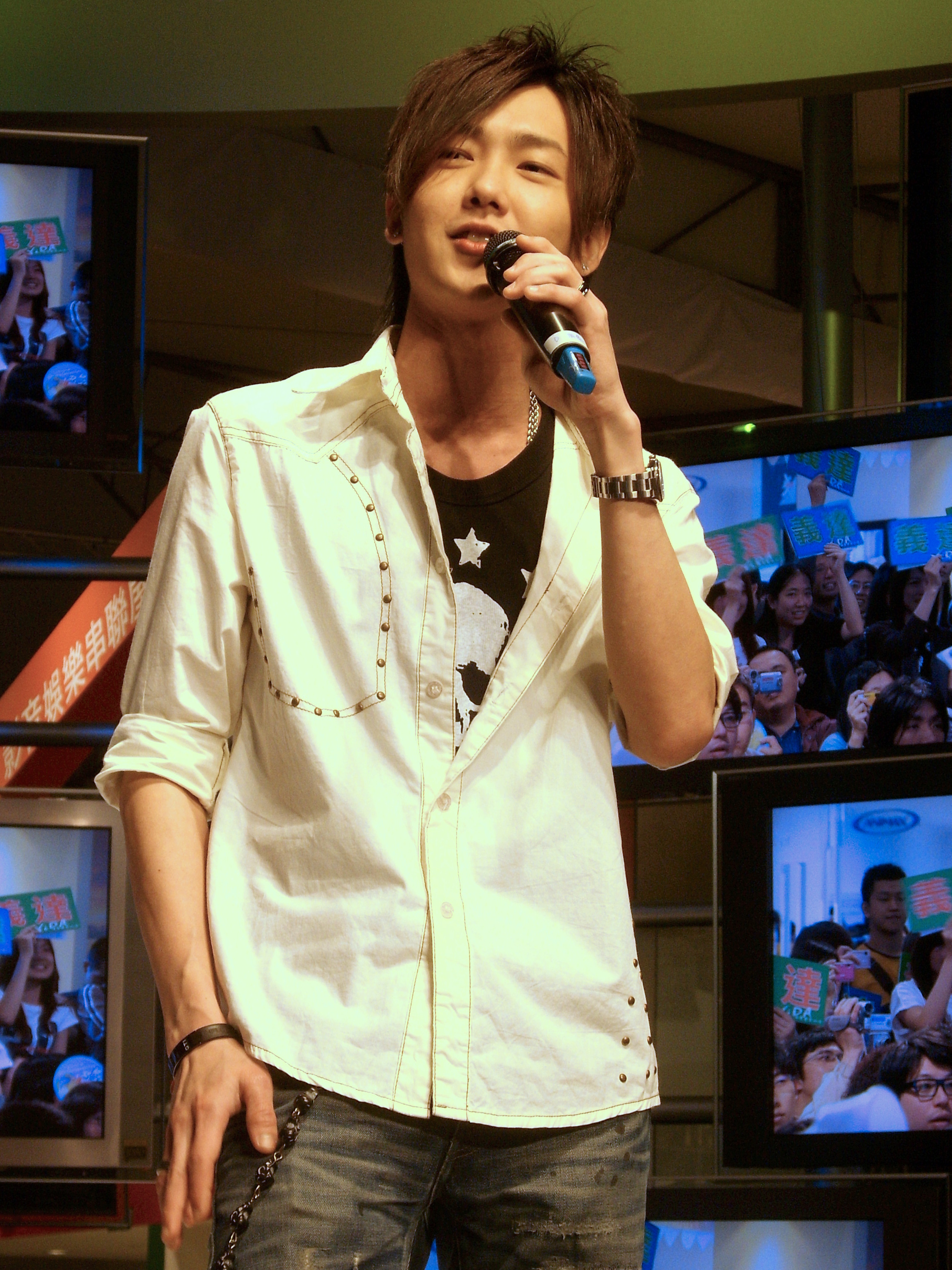 Sony Fair 2008: YiDA Huang.